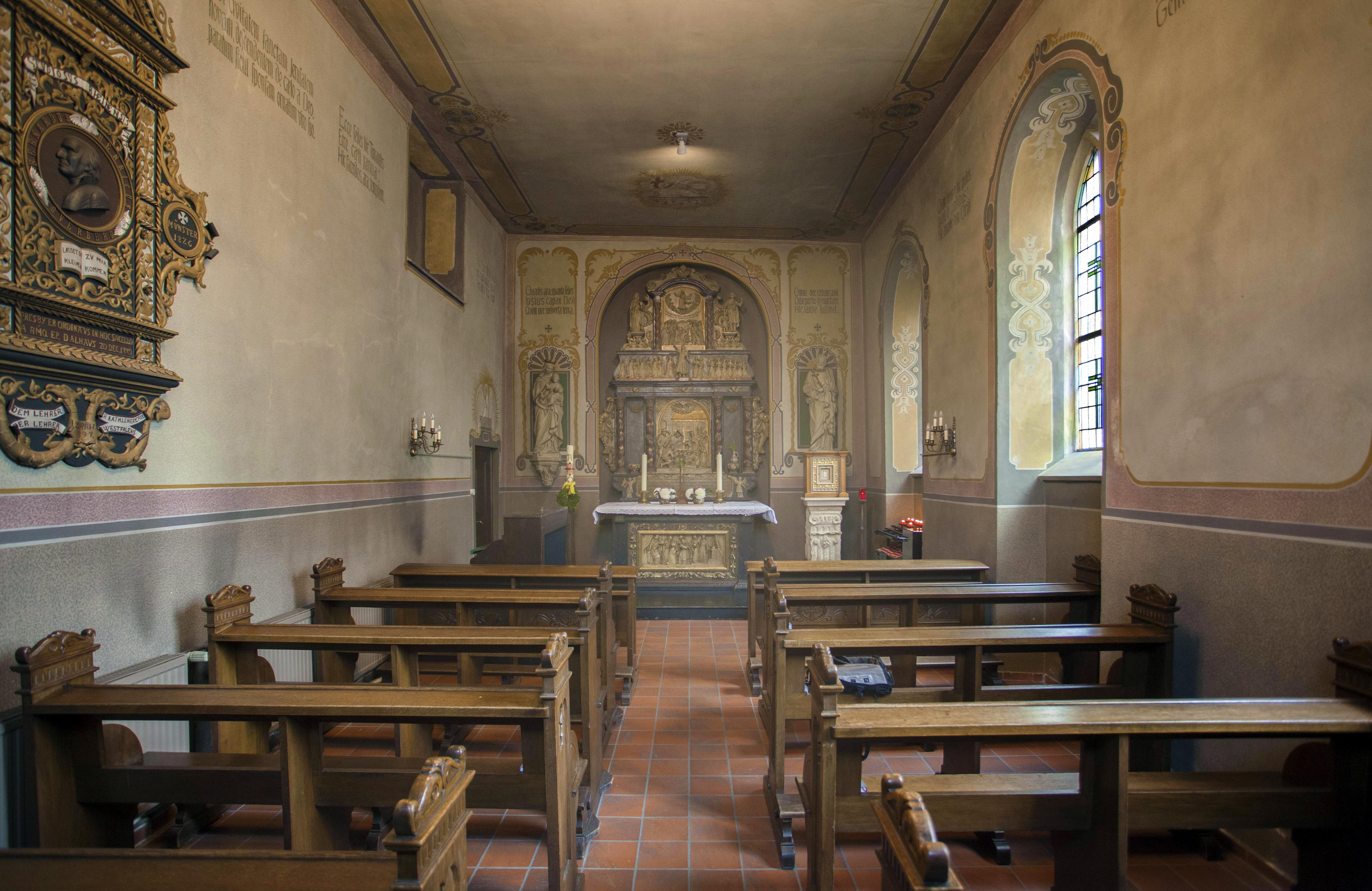 Bönekerskapelle Rheine - Innenansicht nach Osten